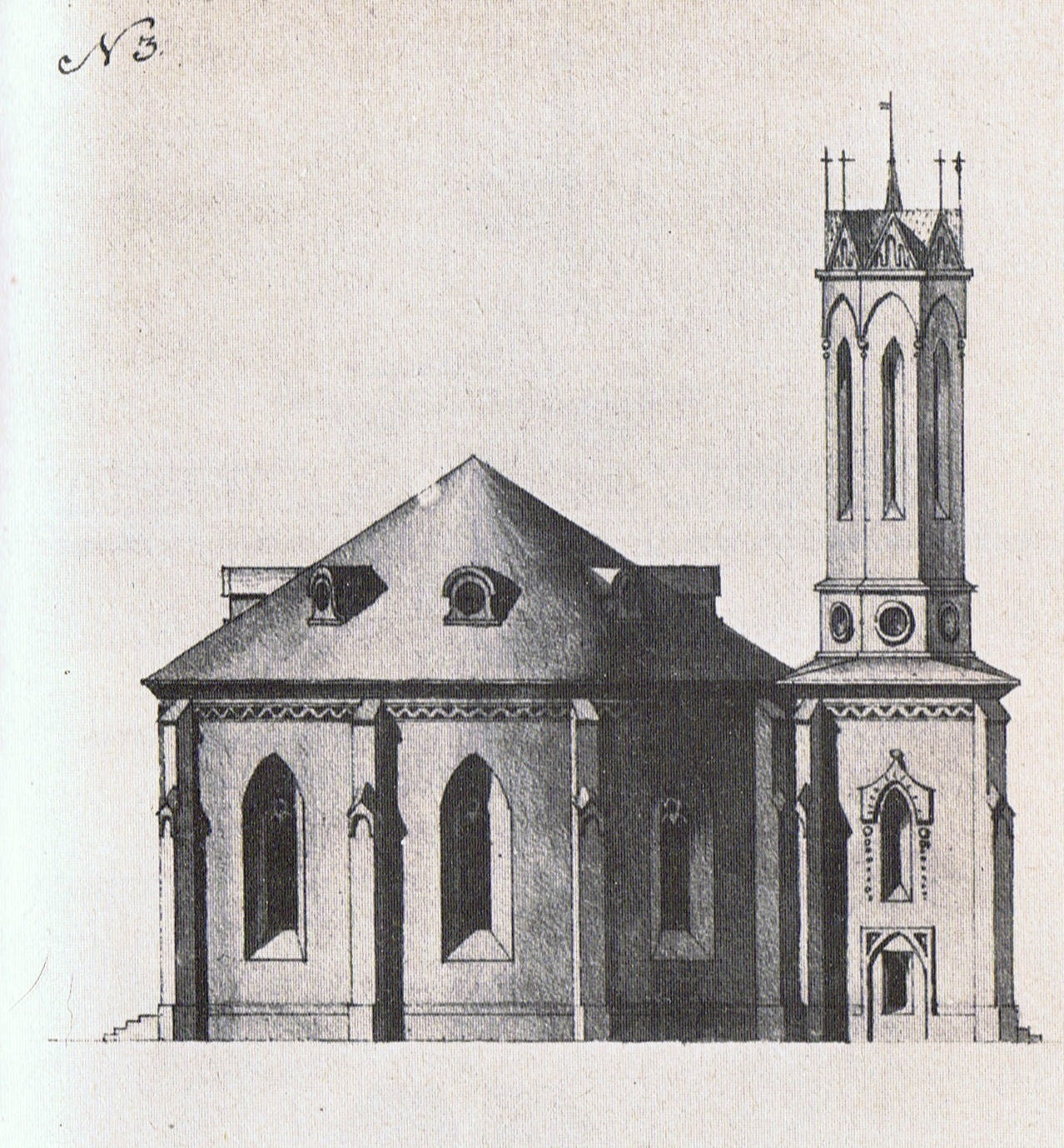 Rundbau mit Turmvorbau, 1814-1825, Feder, laviert, 12 x 12 cm